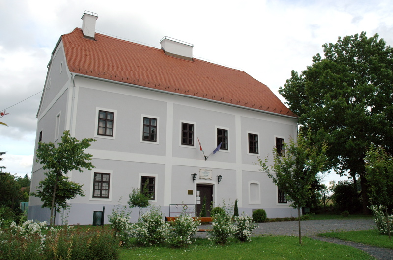 Deák Ferenc szülőháza Söjtörön. 240m2 alapterületű kétszintes épület. Készítette: Varga Attila, 2006. (User:VargaA)